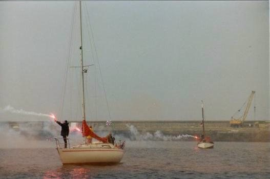 Démonstration de l'emploi de feux de détresse à main en rade de Cherbourg